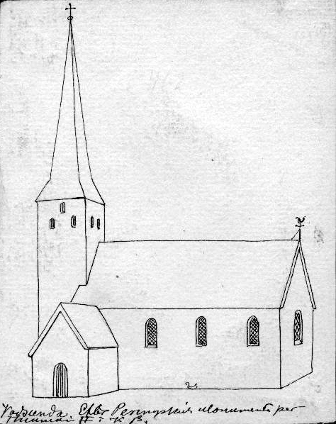 Vassunda kyrka, teckning av Johan Peringskiöld ur hans skrift Then första boken af Swea och Götha minnings-merken vthi Uplandz första del Thiundaland (1710).